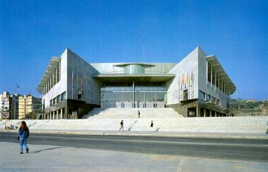 Palau d´Esports in Badalona, Spain